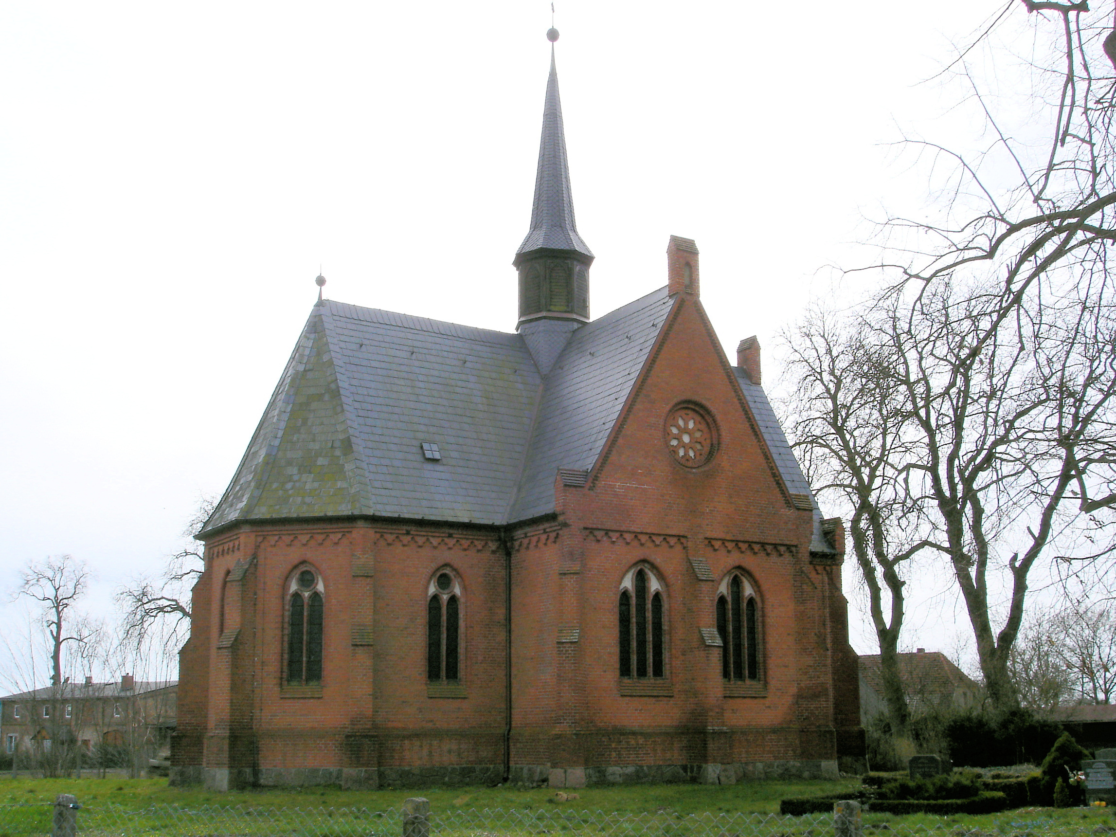 Kirche Gorschendorf / Church in Gorschendorf